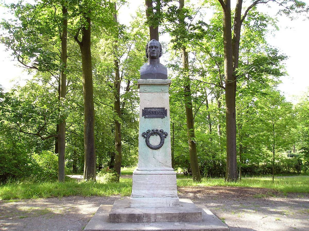 Denkmal für Jean Paul im Englischen Garten von Meiningen, errichtet 1865.